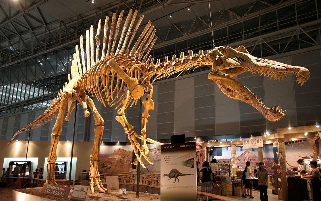 Spinosaurus - 01